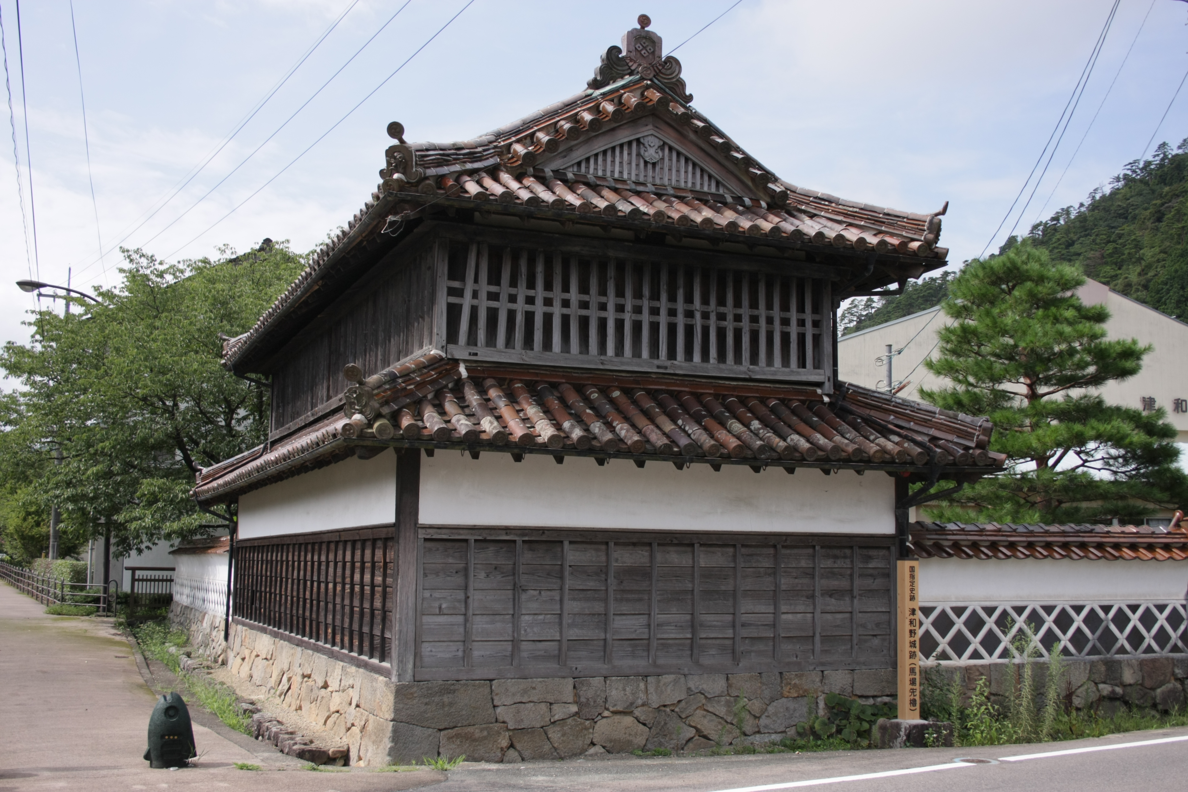 津和野城馬場先櫓